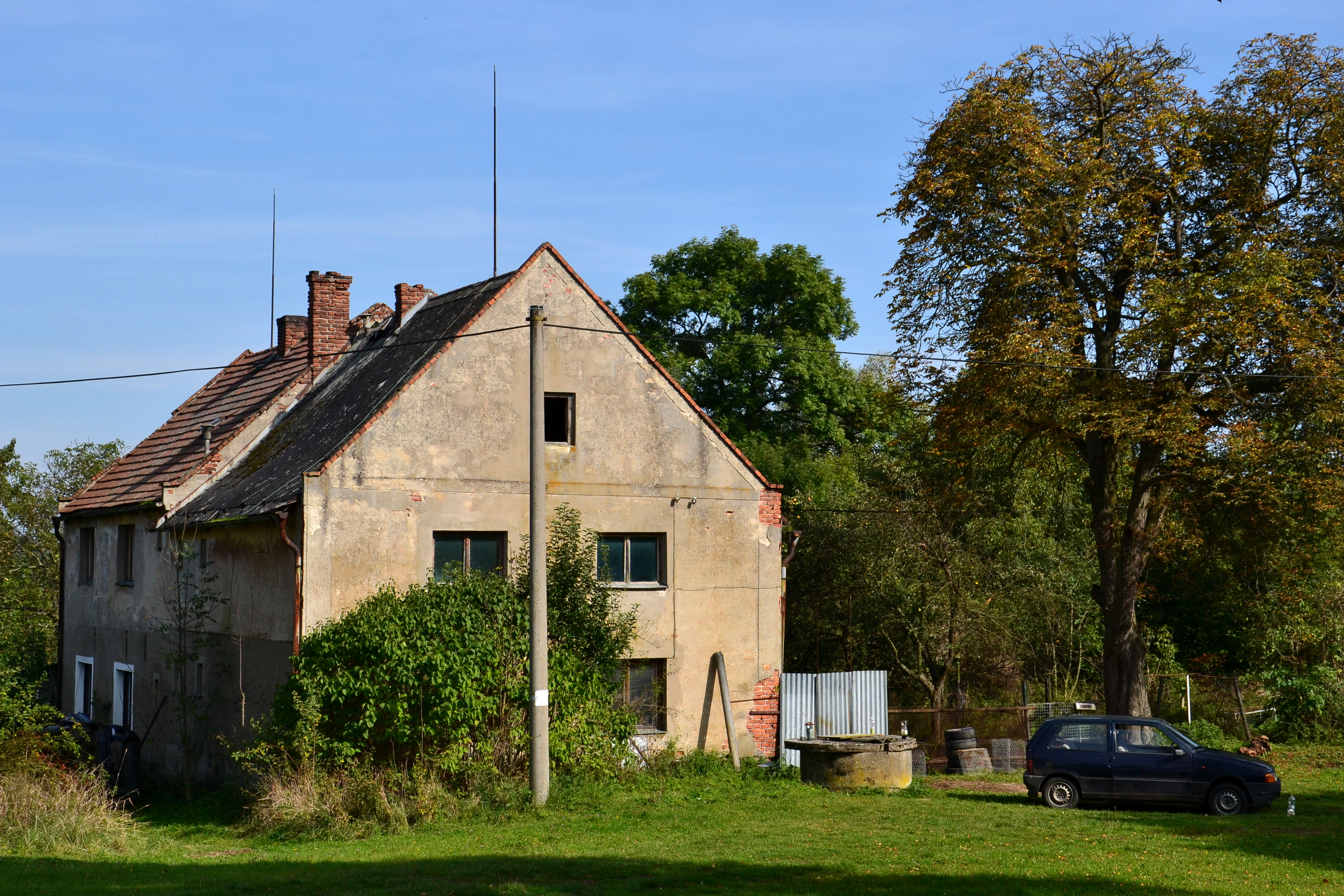 Konice - dům na návsi